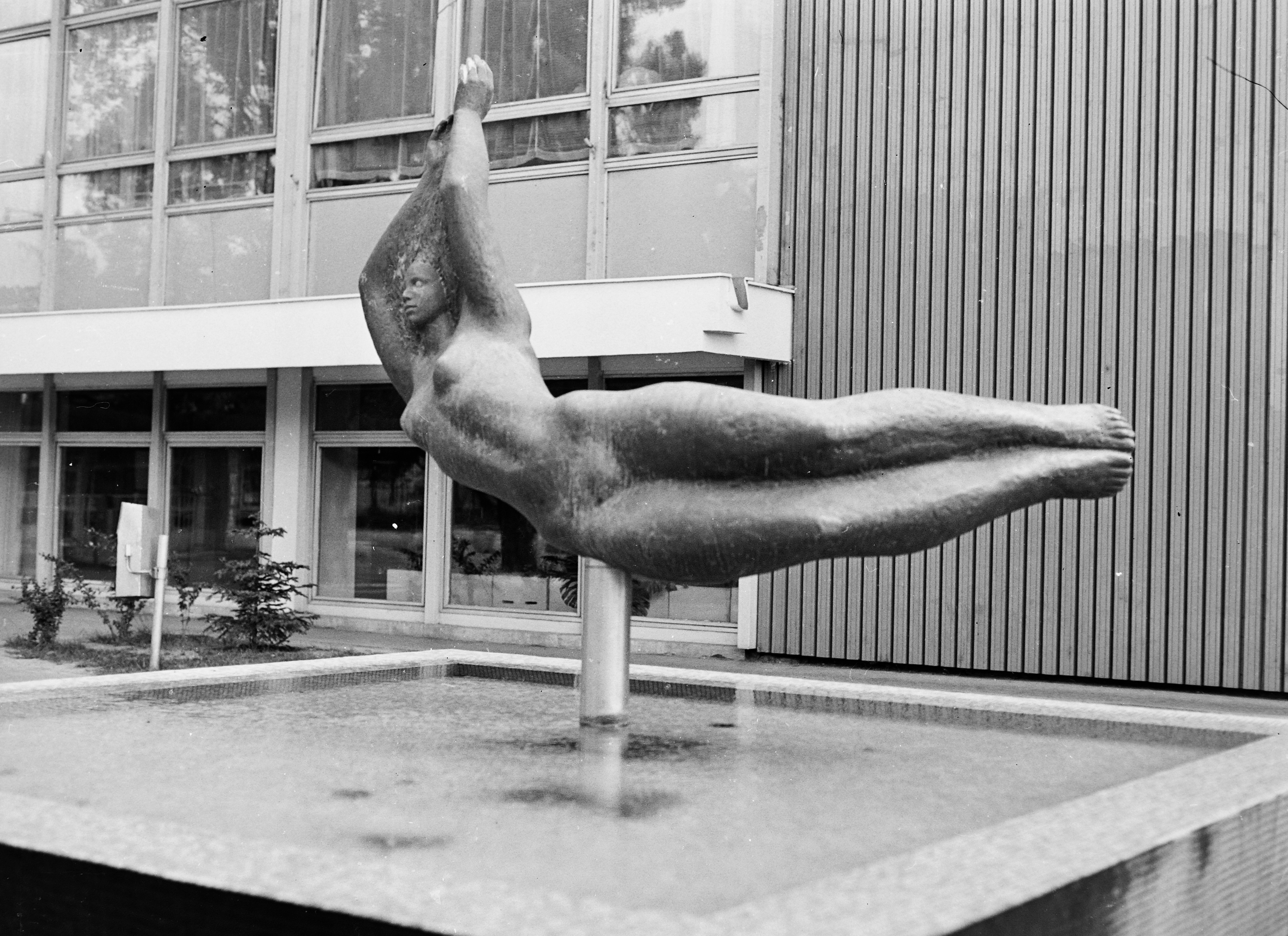 Építők útja, Sellő című szobor (Cyránski Mária, 1978.), mögötte a Sportuszoda. Location: Hungary, Dunaújváros Tags: sculpture Title: Építők útja, Sellő című szobor (Cyránski Mária, 1978.), mögötte a Sportuszoda.